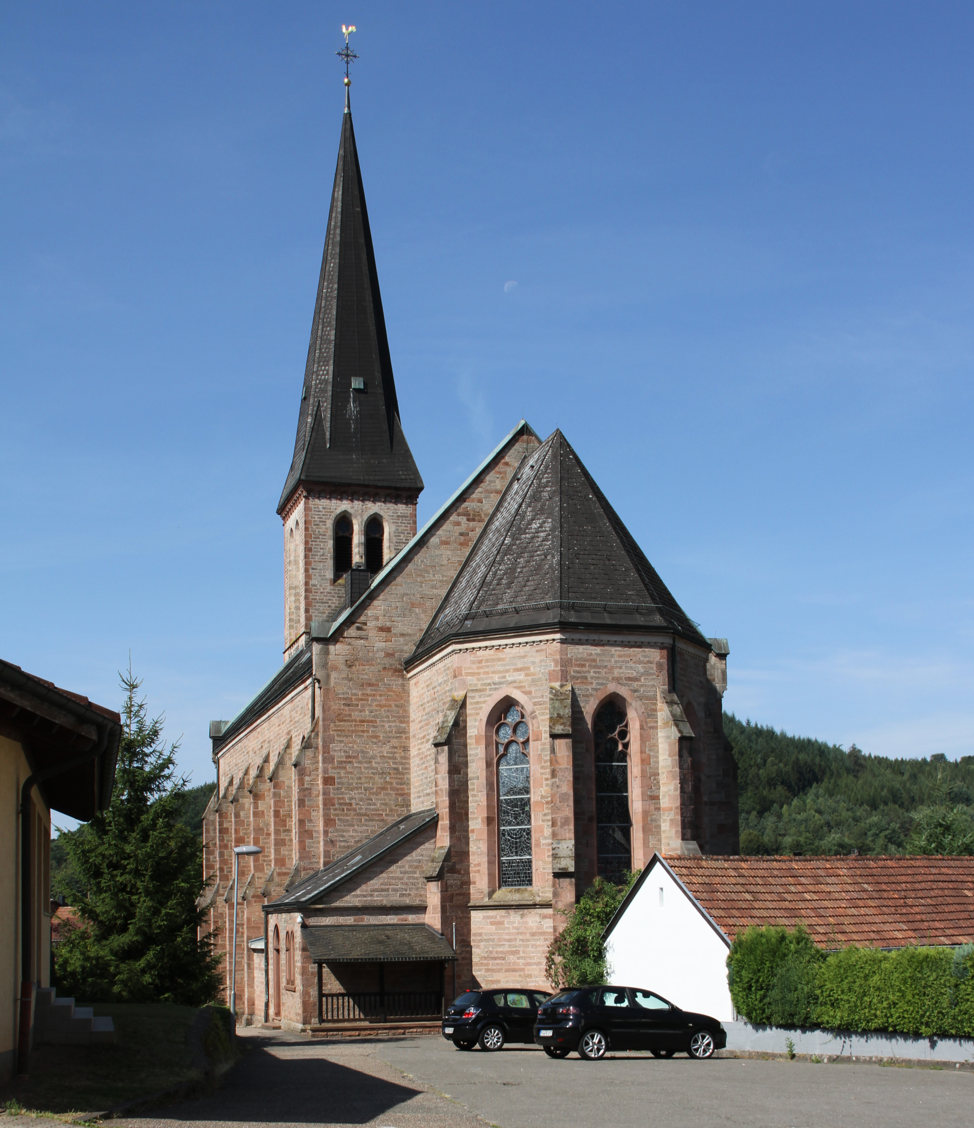 Münchweiler an der Rodalb, katholische Pfarrkirche St. Georg, Kirchgasse 3; neugotische Sandsteinhalle, 1893/94, Architekt Wilhelm Schulte I., Neustadt an der Weinstraße.